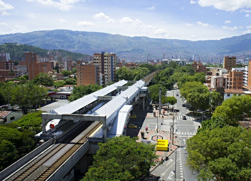 Estación Floresta (Metro de Medellín)